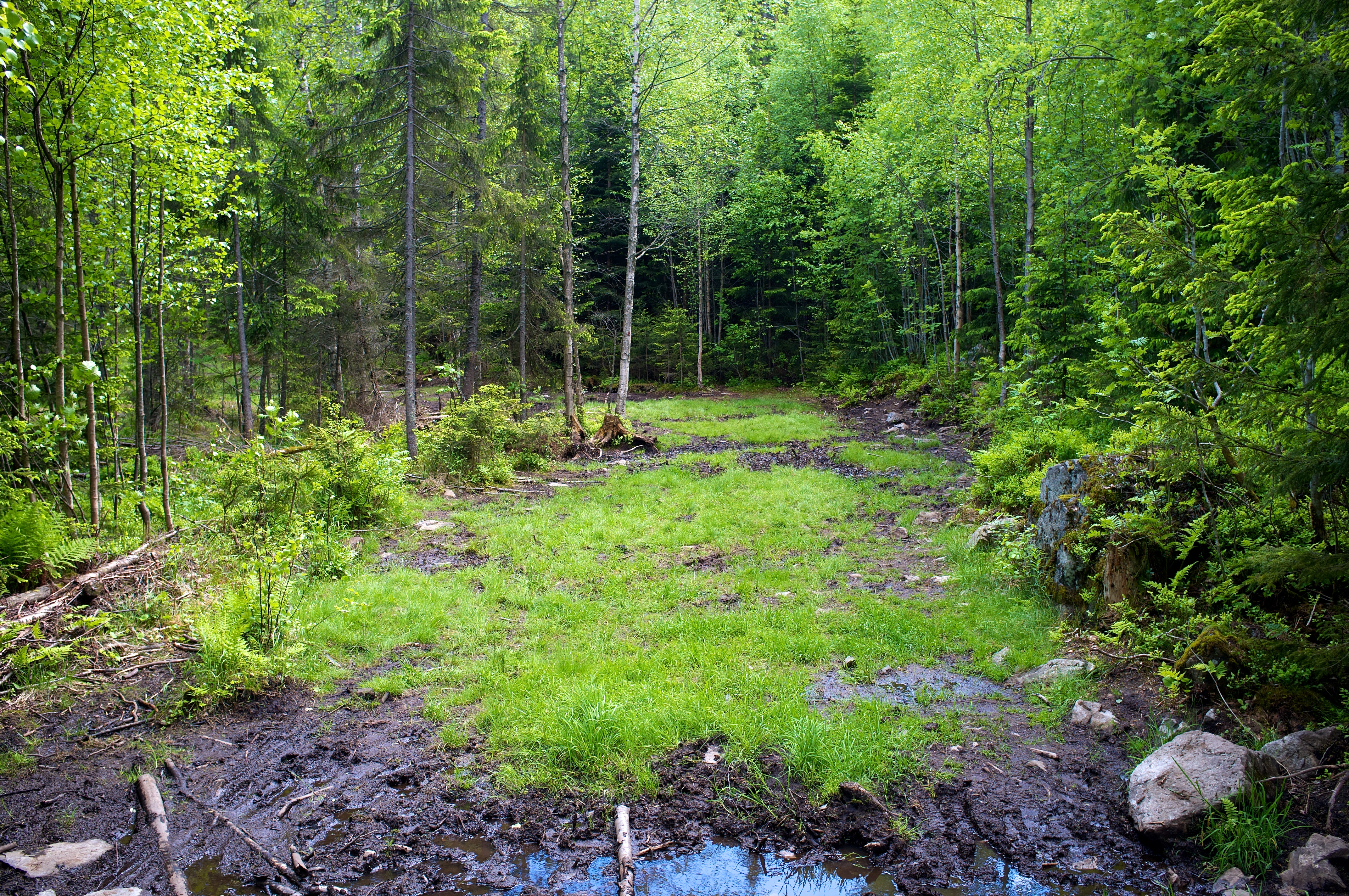 «Svenskehølet» i Bærum